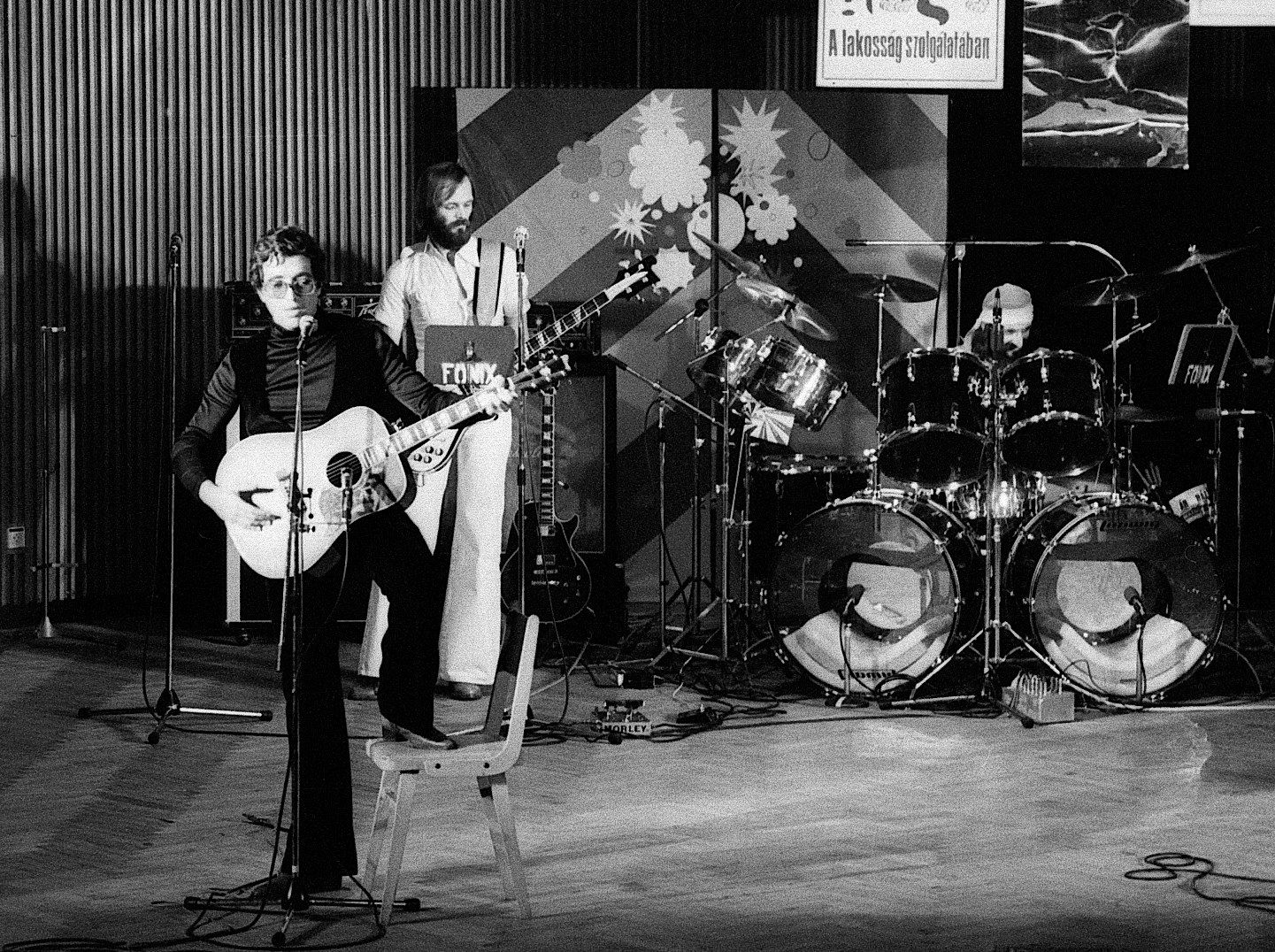 Máté Péter és a Főnix együttes a békéscsabai Ifjúsági Ház színpadán